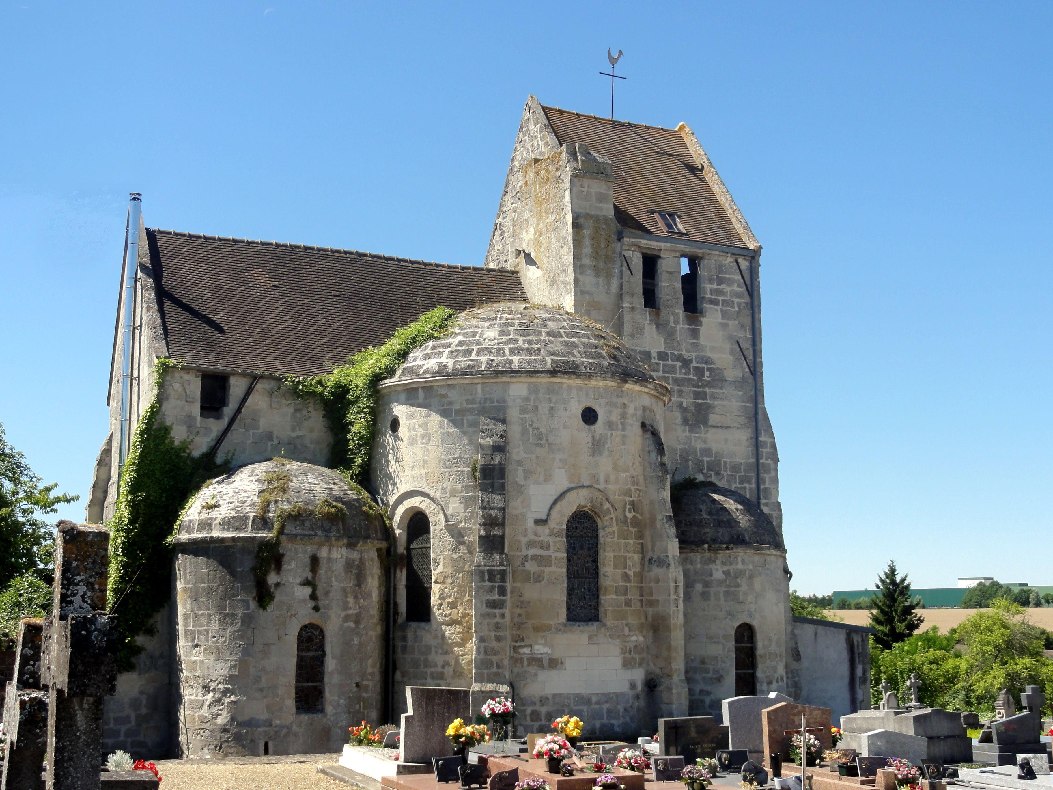 Chevet de l'église.